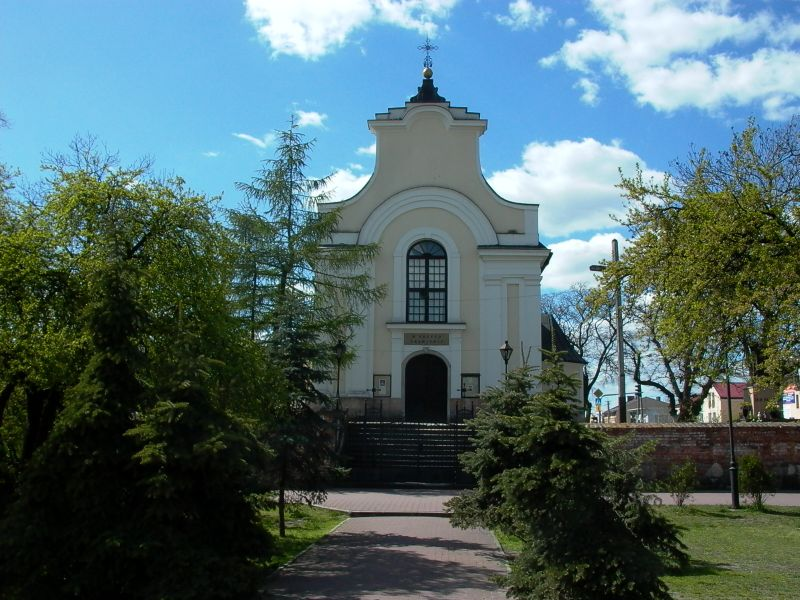 Kościół Podwyższenia Krzyża Świętego w Górze Kalwarii (Feast of the Cross church in Góra Kalwaria).